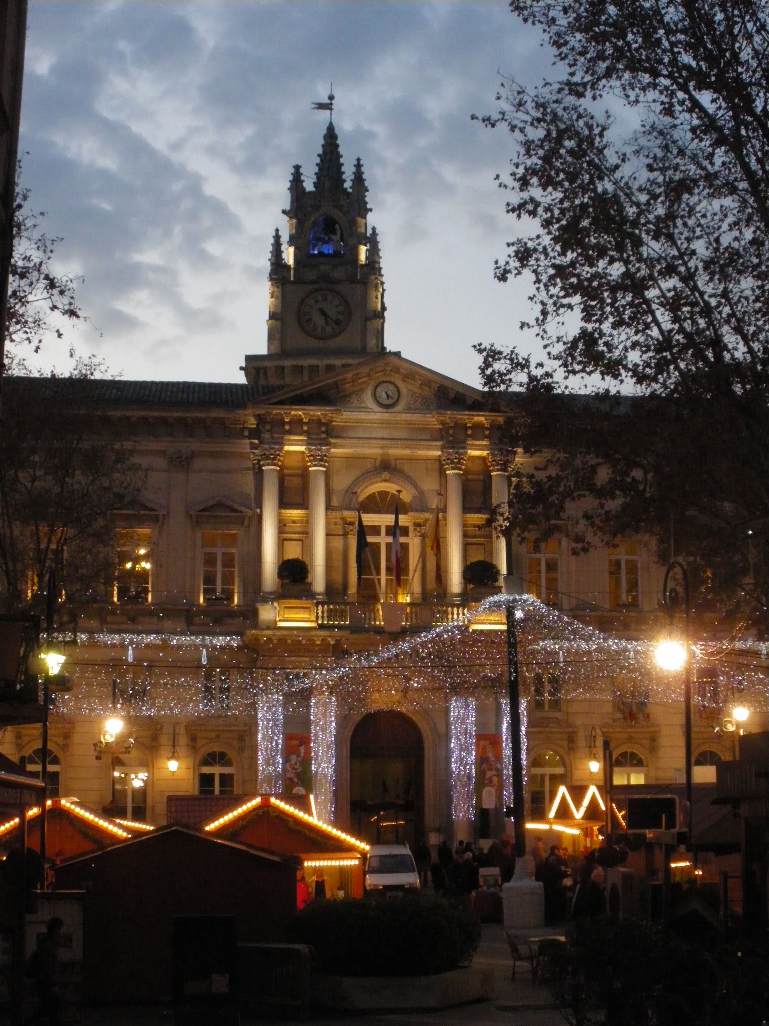 Mairie d'Avignon et le marché de Noël sur la place de l'horloge